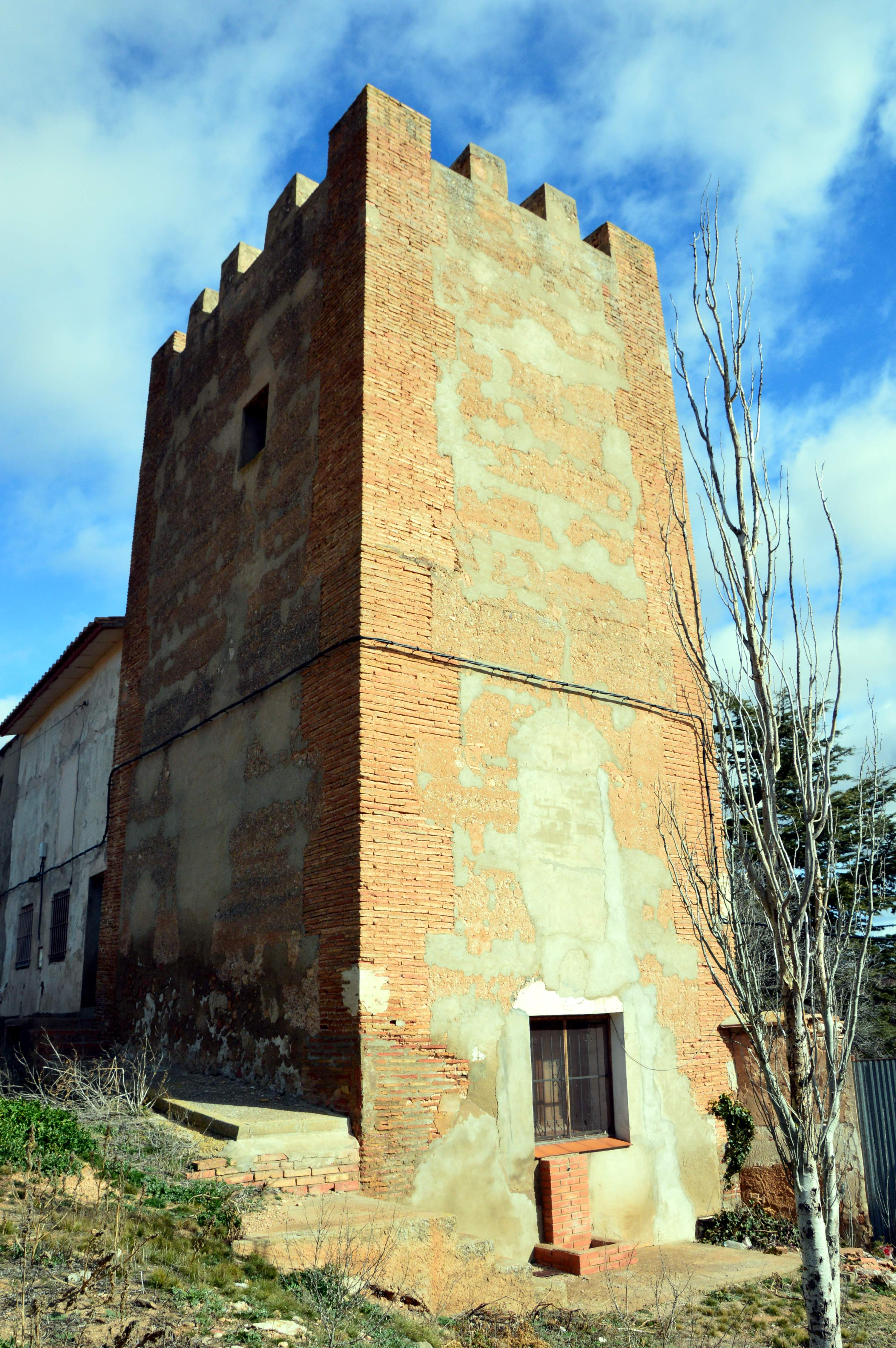 Vista frontolateral izquierda (suroccidental) de la Torre de Villastar (Teruel), 2019.